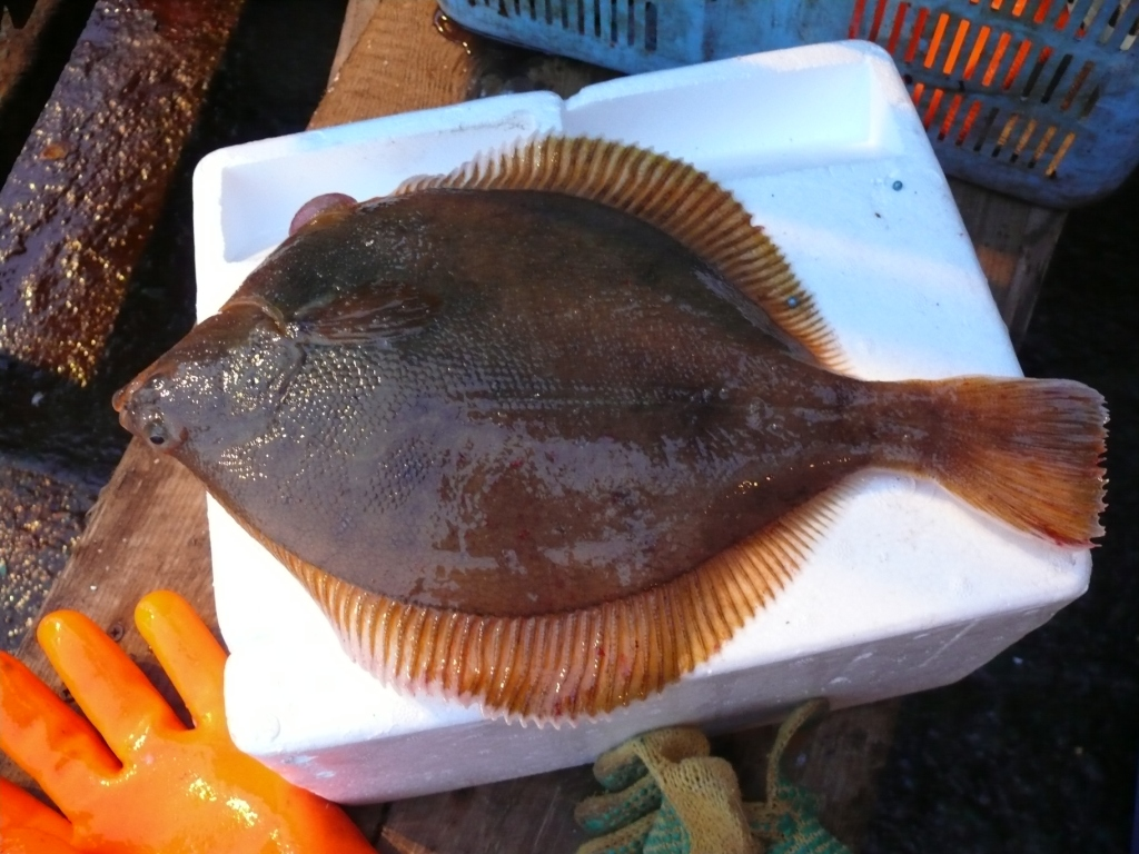 Желтопёрая камбала северных Курильских островов